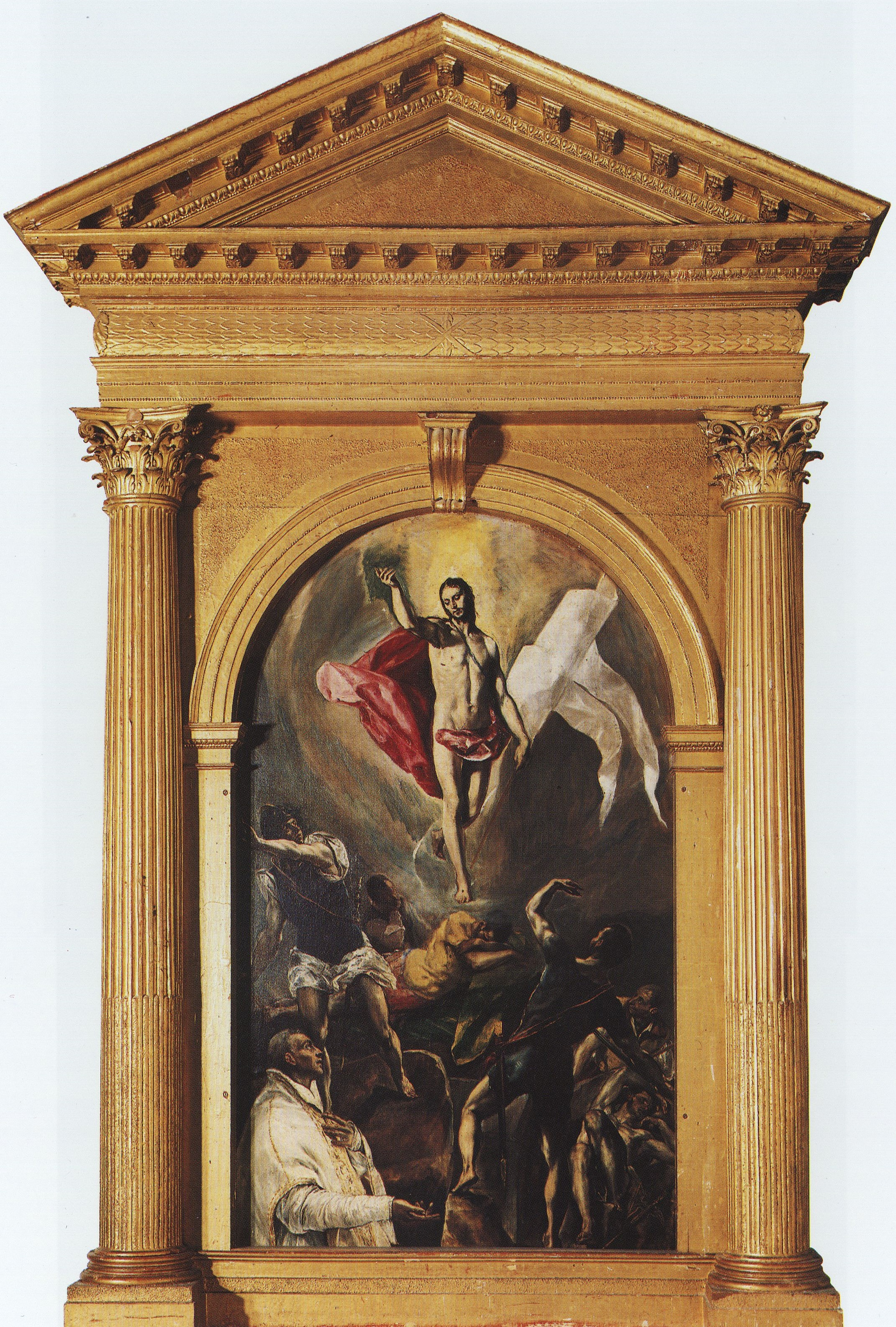 La obra representa la Resurrección de Jesús.